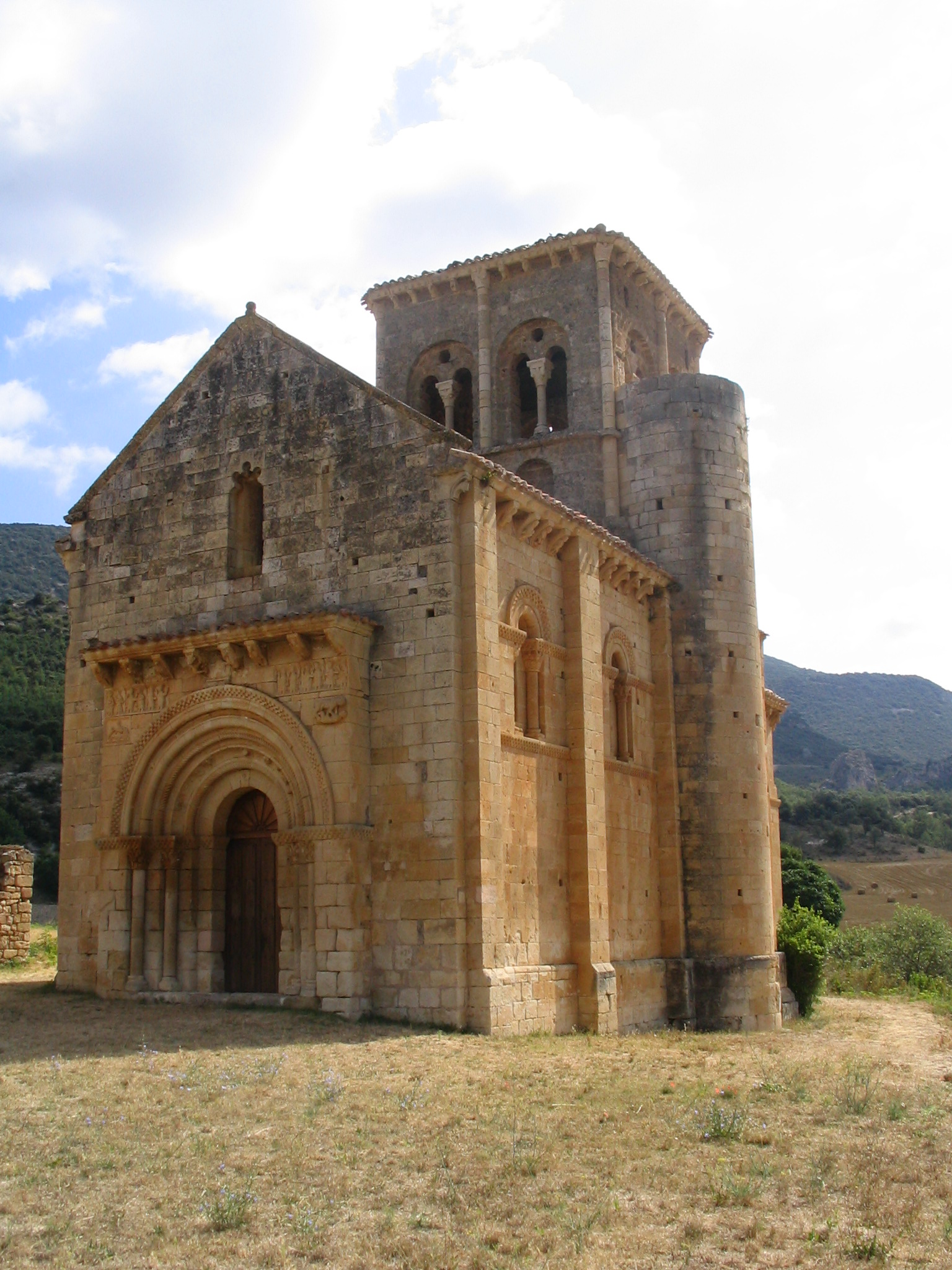 Església romànica de San Pedro de Tejada. Burgos.